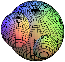 Figura realizada por M.Romero Schmidkte ✉ con el programa Mapple, especialmente para la Enciclopedia Libre y la Wikipedia.